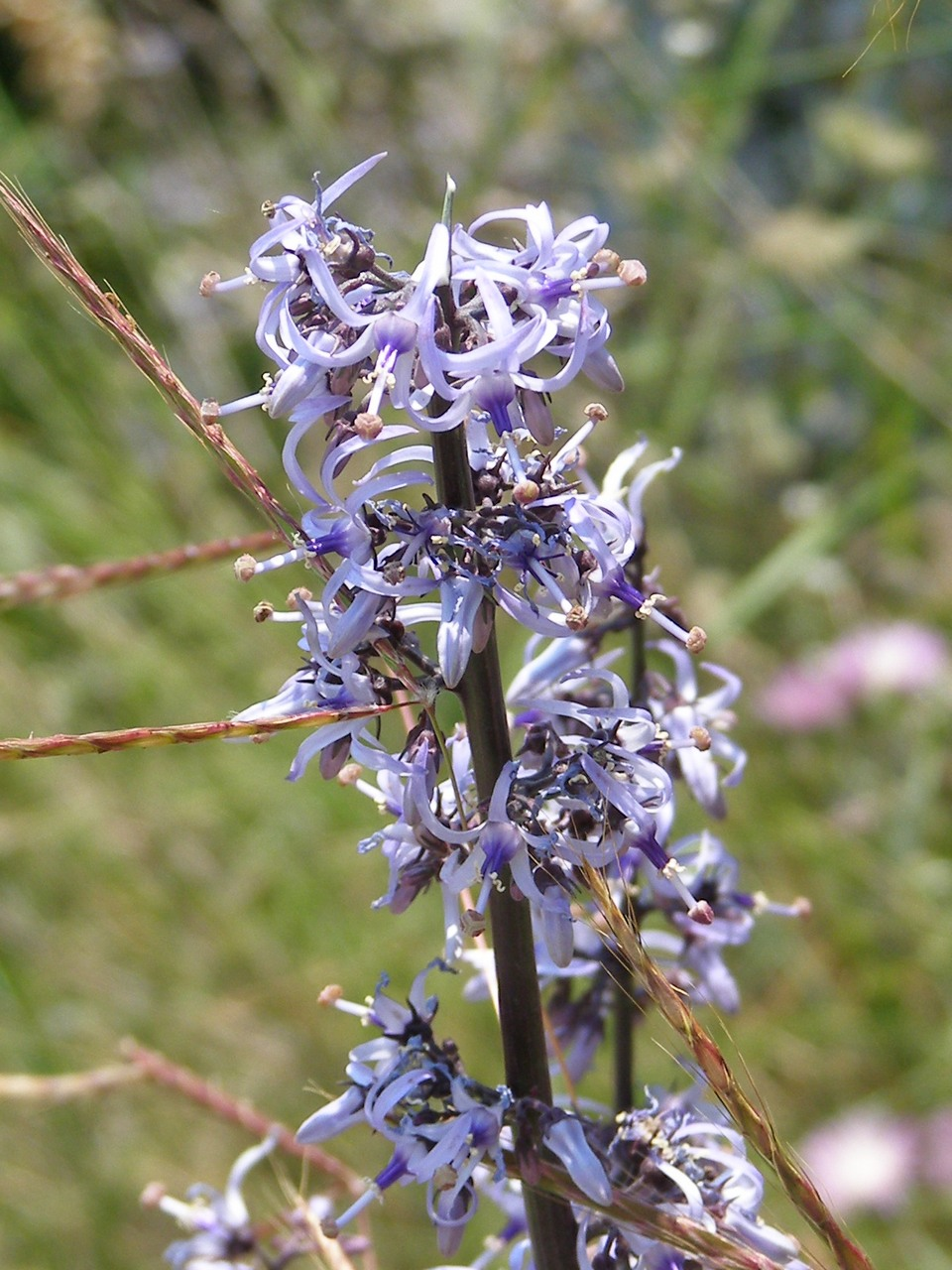 Petromarula pinnata, Detail, Blüten